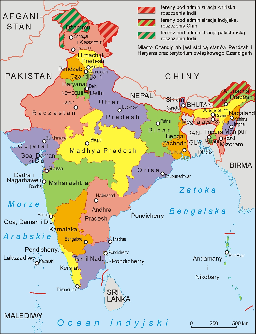 Podział administracyjny Indii w 1975 roku. Autor Aotearoa